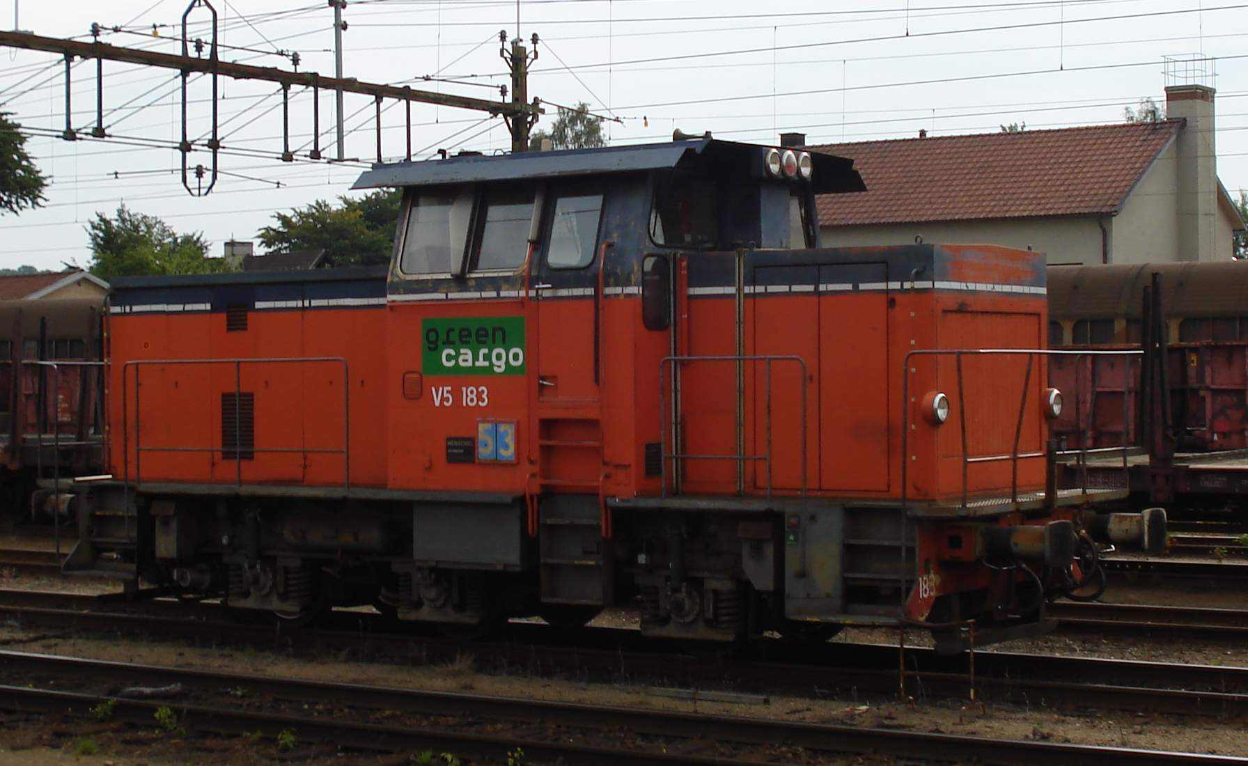 Green Cargos V5 183 i Alvesta 2007-08-02